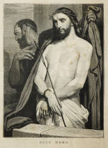 Ilustració Catalana, primera època, número 082 Data: 15 de Març de 1883 pàg. 63